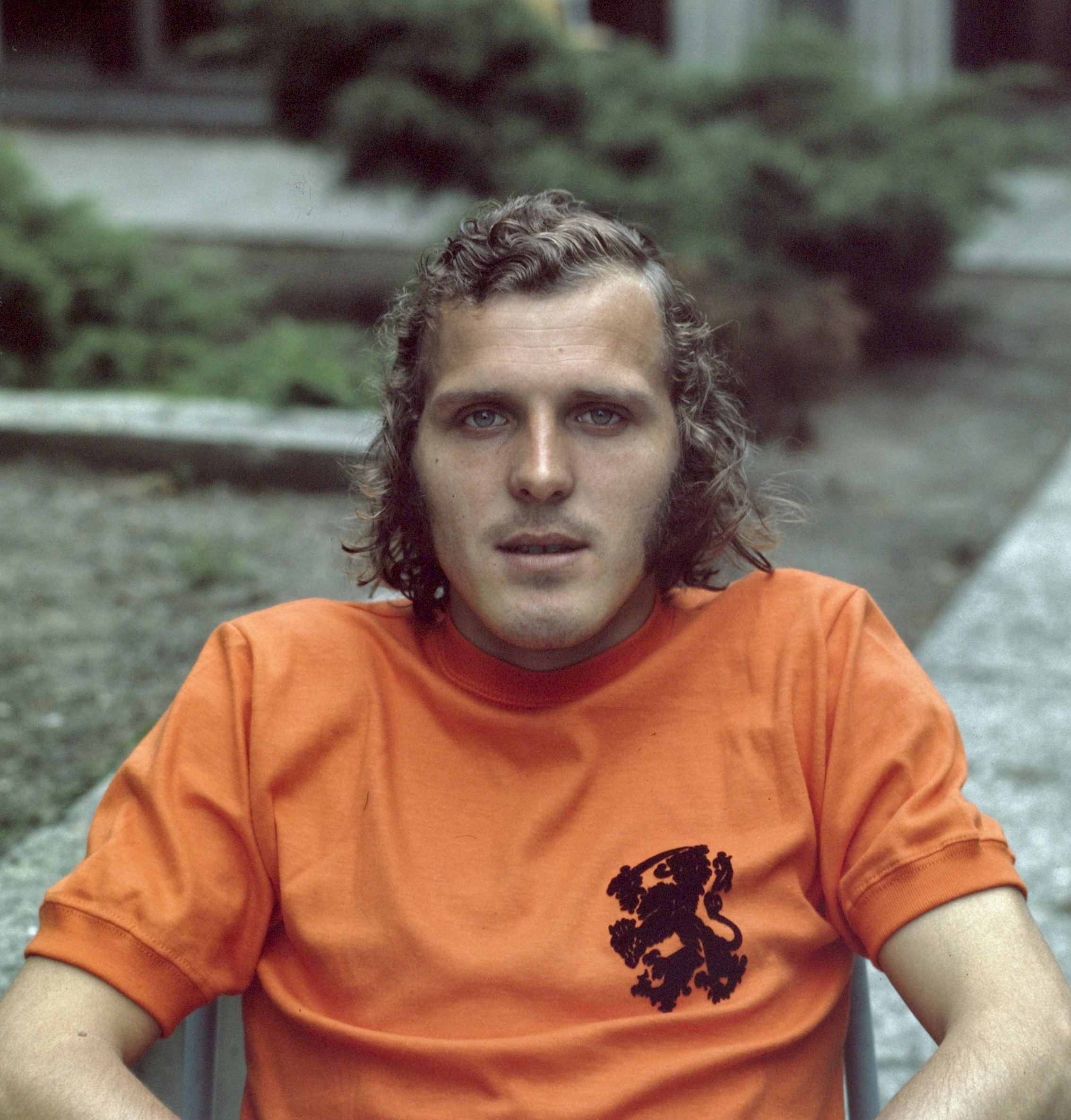 René van de Kerkhof